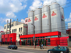 A kolozsvári sörgyár, Pasztilla jóvoltából és engedélyével.